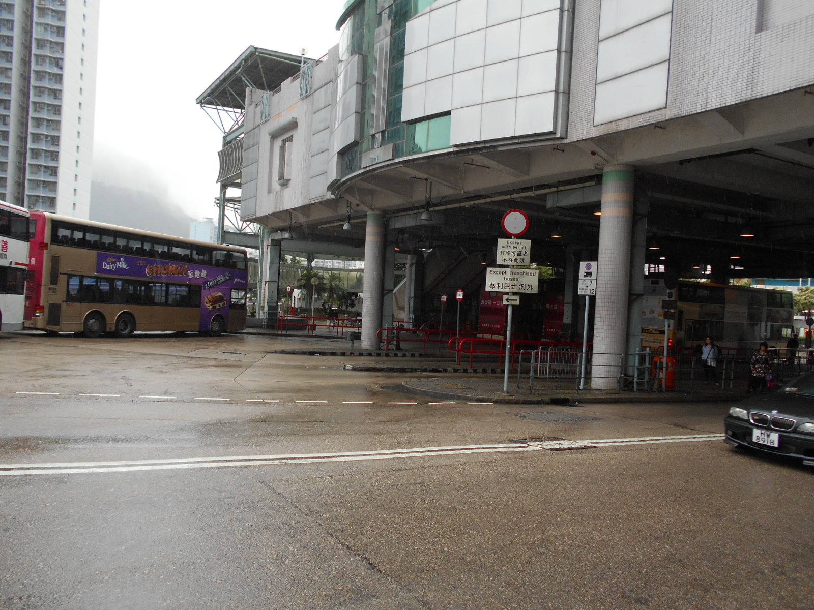 中文（香港）: 葵盛東巴士總站(2016年)